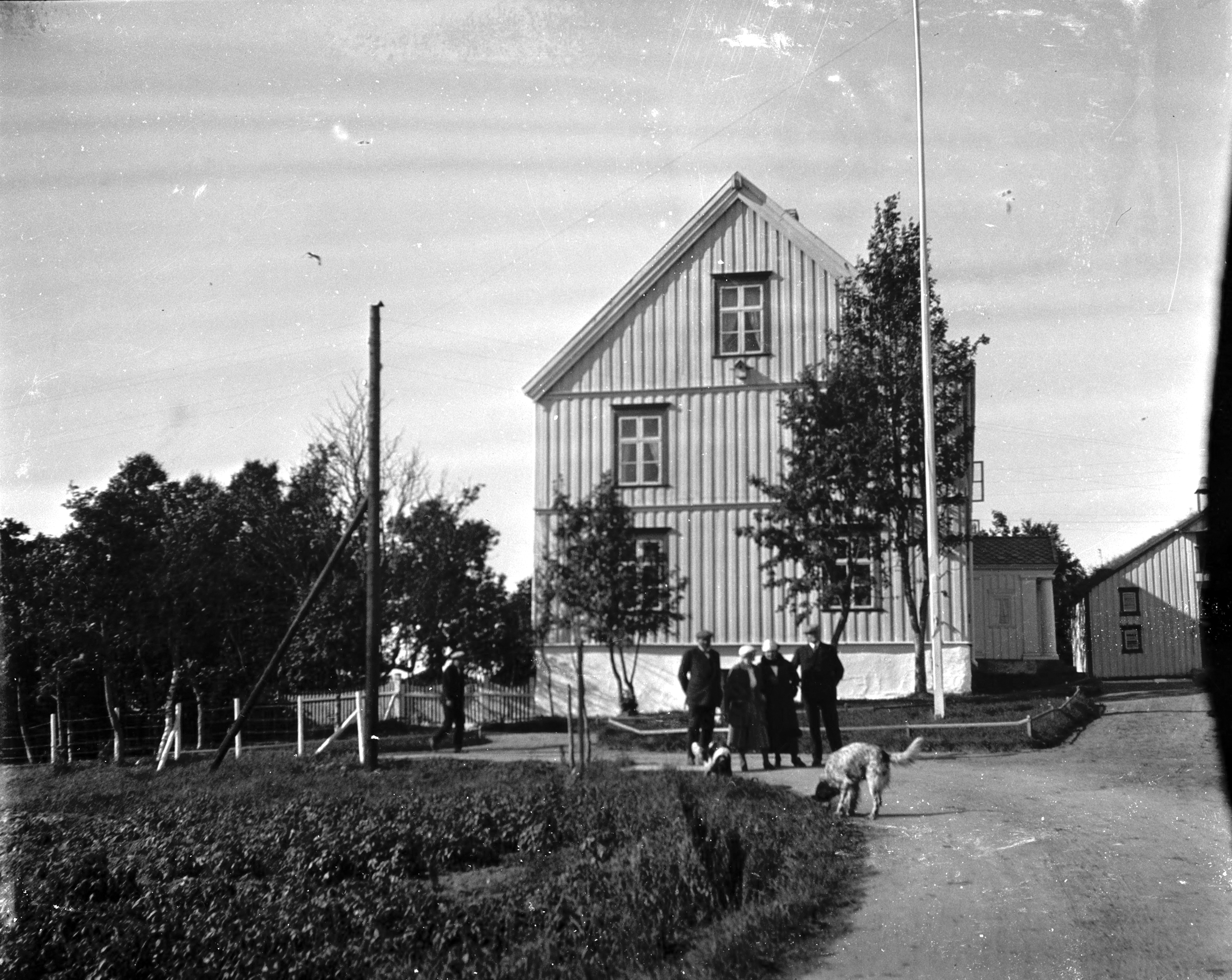 Melbu hovedgård i Hadsel kommune, Vesterålen. Melbu hovedgård (Vesterålen Museum) Arkivreferanse / Archive reference: Tor.Hxx.Bxx.F4539 Merknad: Bilder fra tidligere ordfører Andreas Moe og hans kone Sigrid (Sissi) på tur med Hurtigruten i 1930-åra.